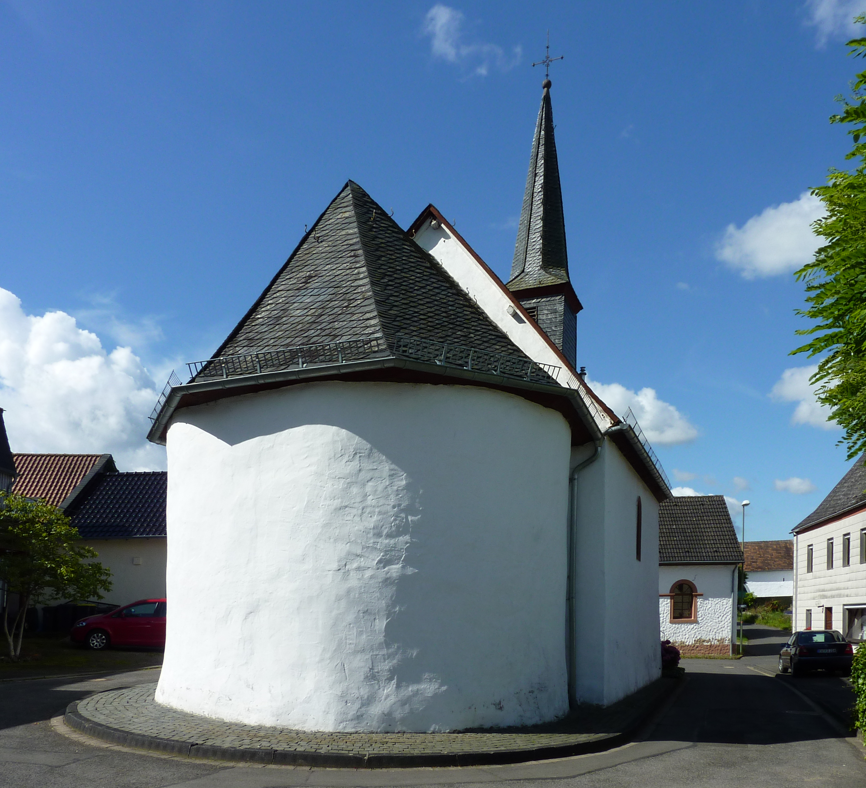 Hüngersdorf, Kapellenplatz 1, kath. Kapelle St. Anna, Chor von O